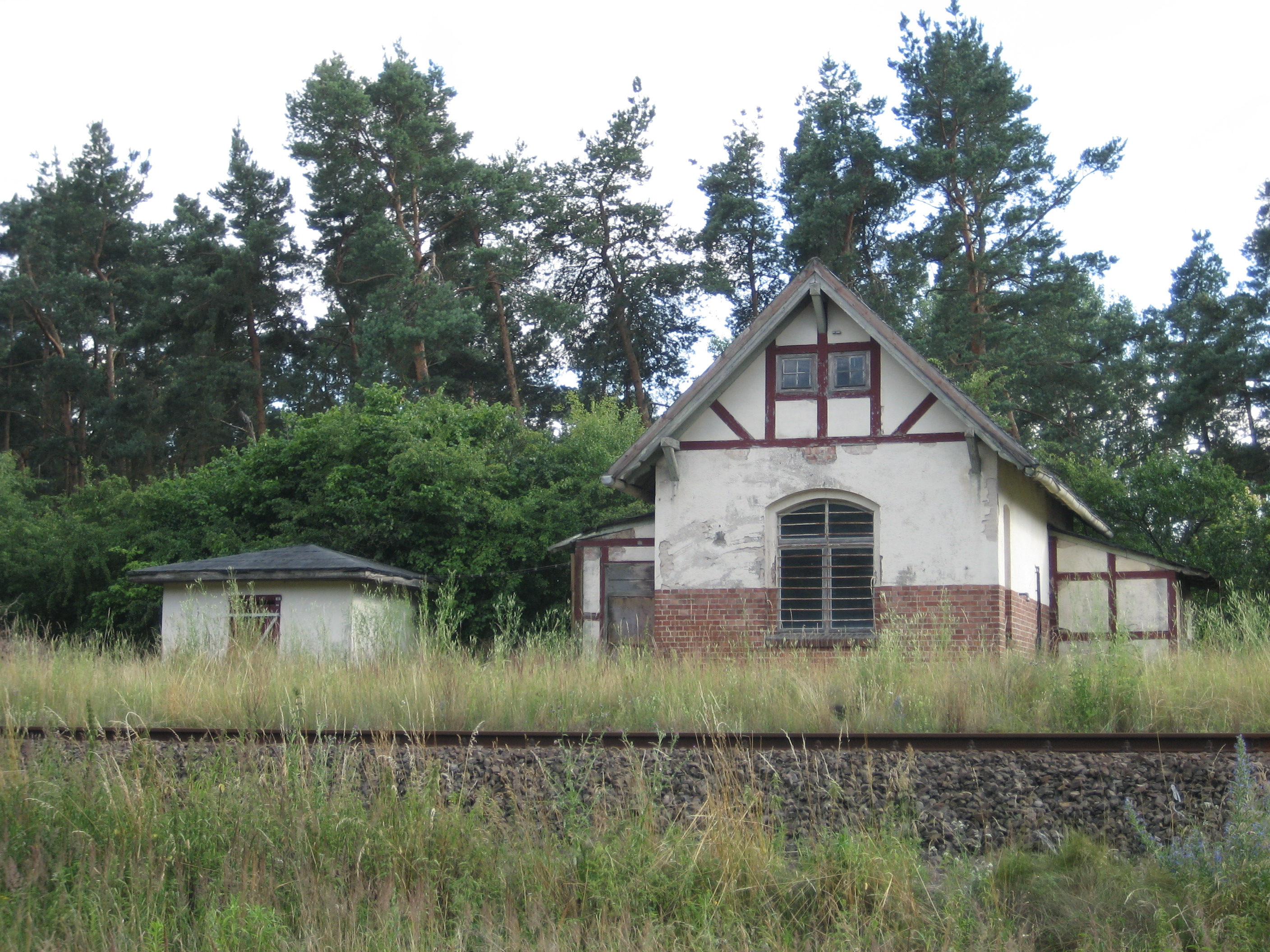 Der Alte Bahnhof von Rossow aus Blickrichtung Norden.